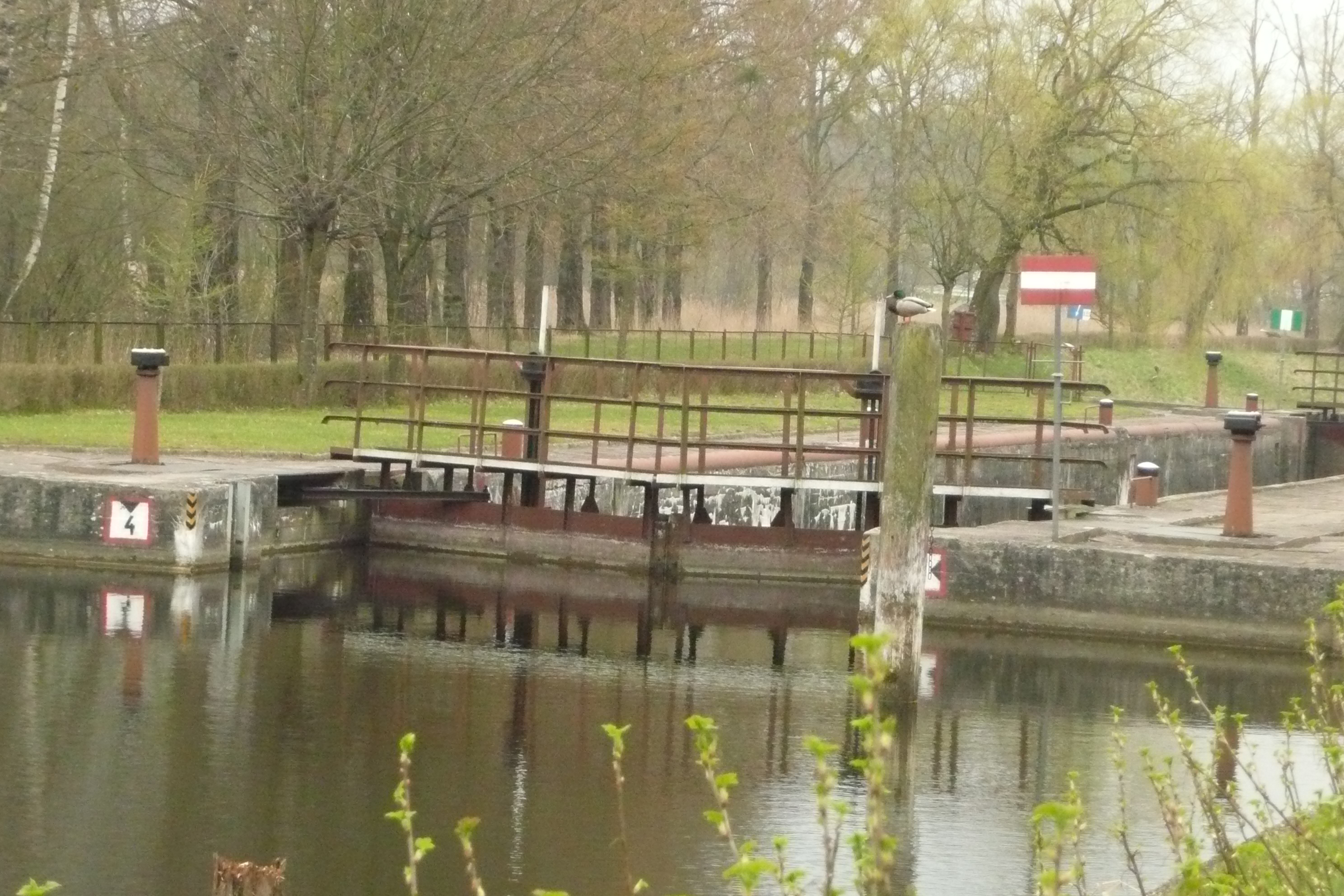 Śluza na Kanale Augustowskim w Białobrzegach